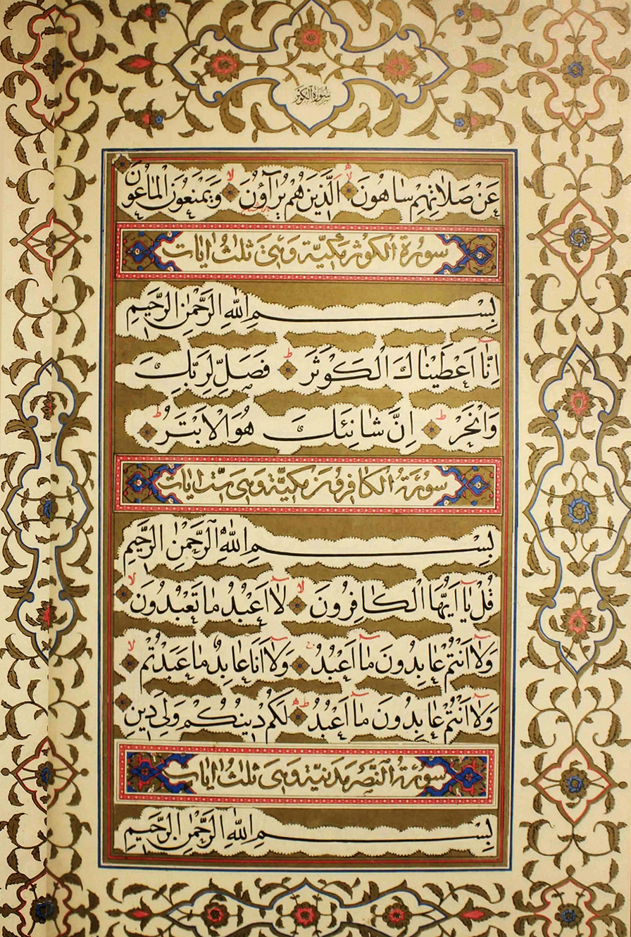 صفحه ای از قرآن نیرزی (سوره کافرون و سوره کوثر)